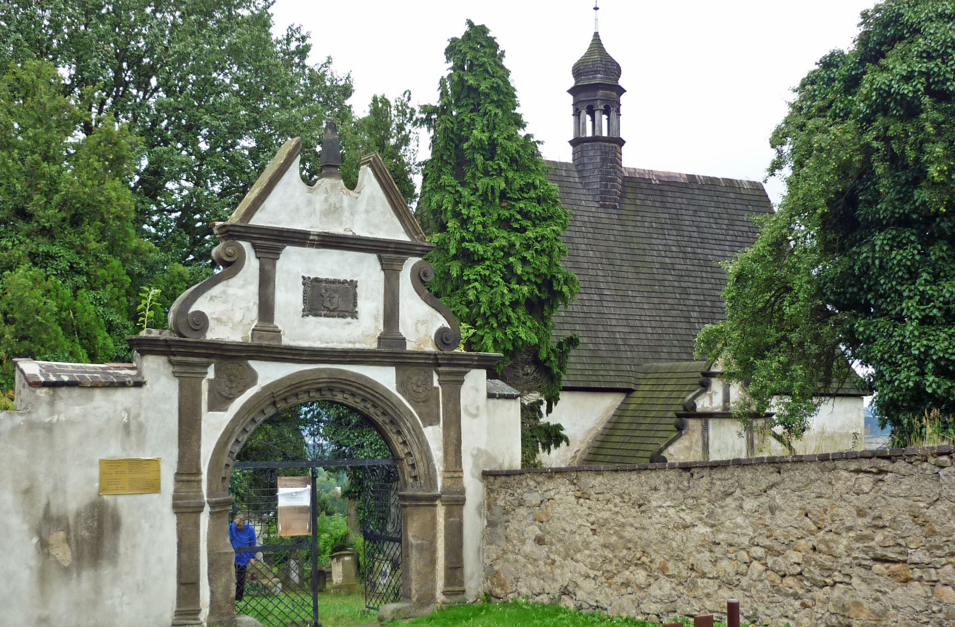 Kirche St. Anna auf dem alten Friedhof in Graupen (Krupka)